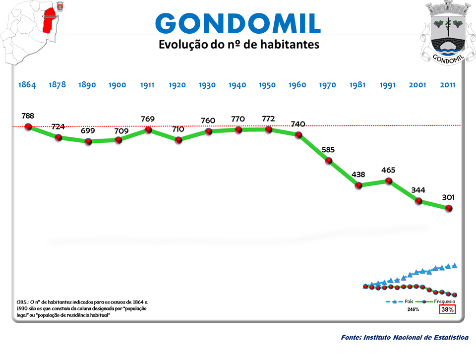 Censos 1864/2011